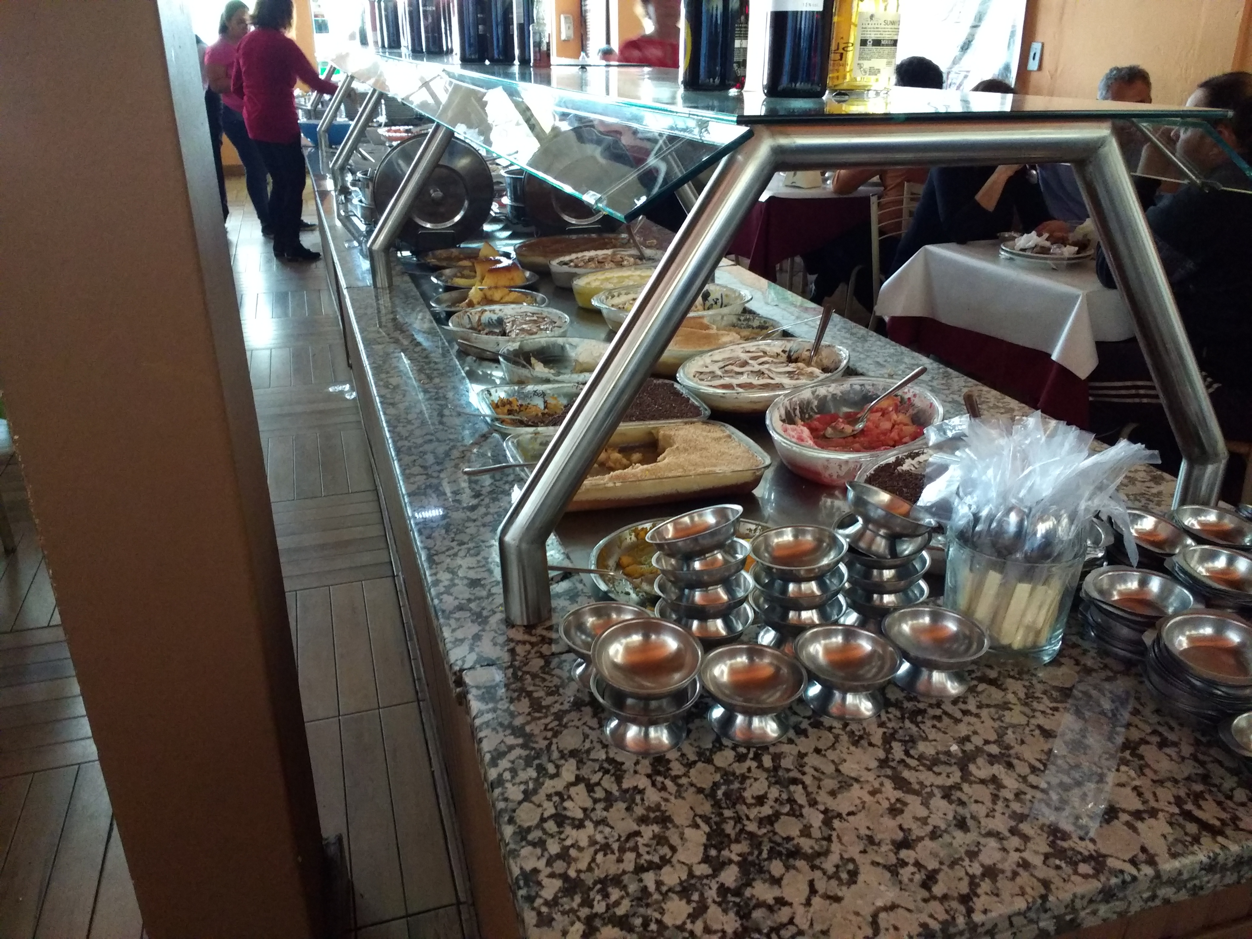 Coisa Nossa, a buffet restaurant in Santana do Livramento.